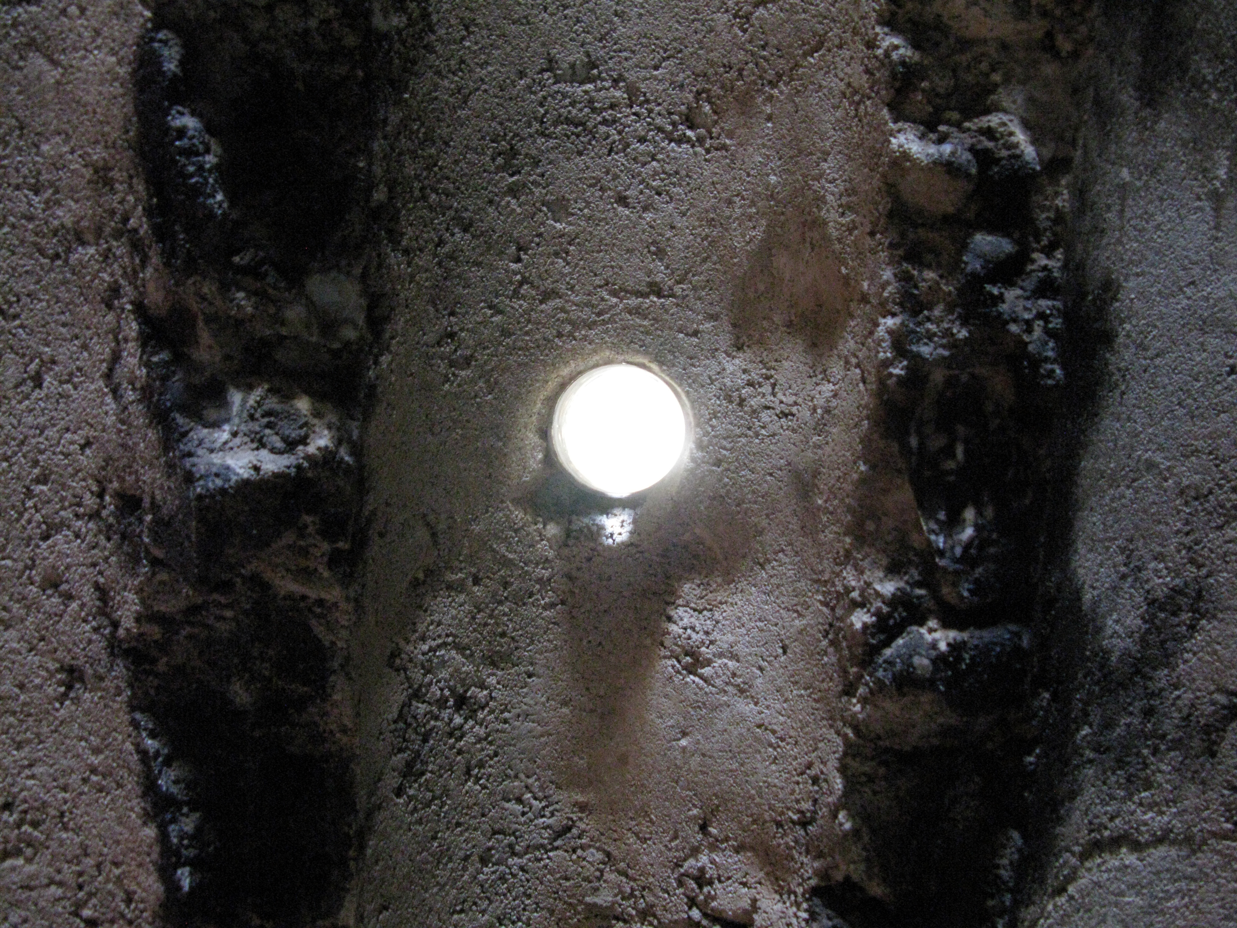 Bruder-Klaus Feldkapelle von Peter Zumthor in Mechernich-Wachendorf, Stampfbetonwand mit mundgeblasenem Glaspfropfen